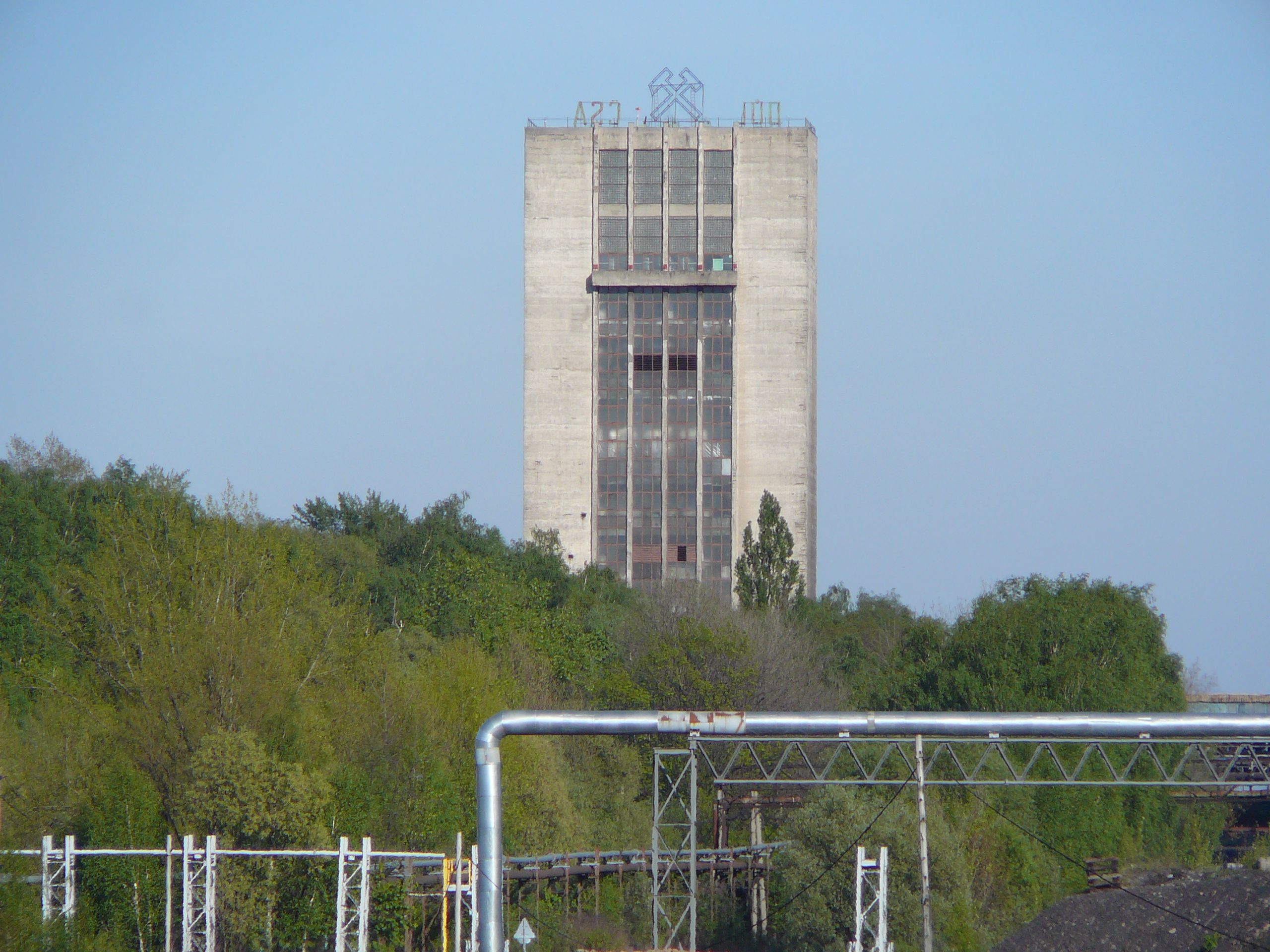 Skipová těžní věž závodu Jan-Karel